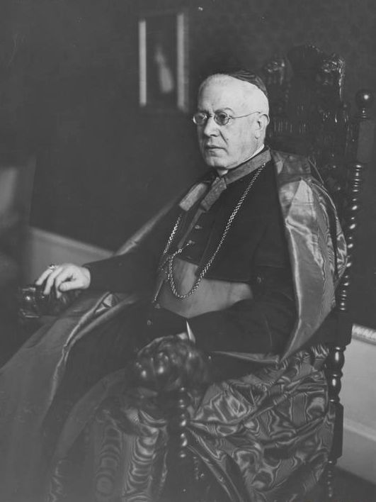 nuncjusz apostolski w Polsce kardynał Lorenzo Lauri (1864-1941)